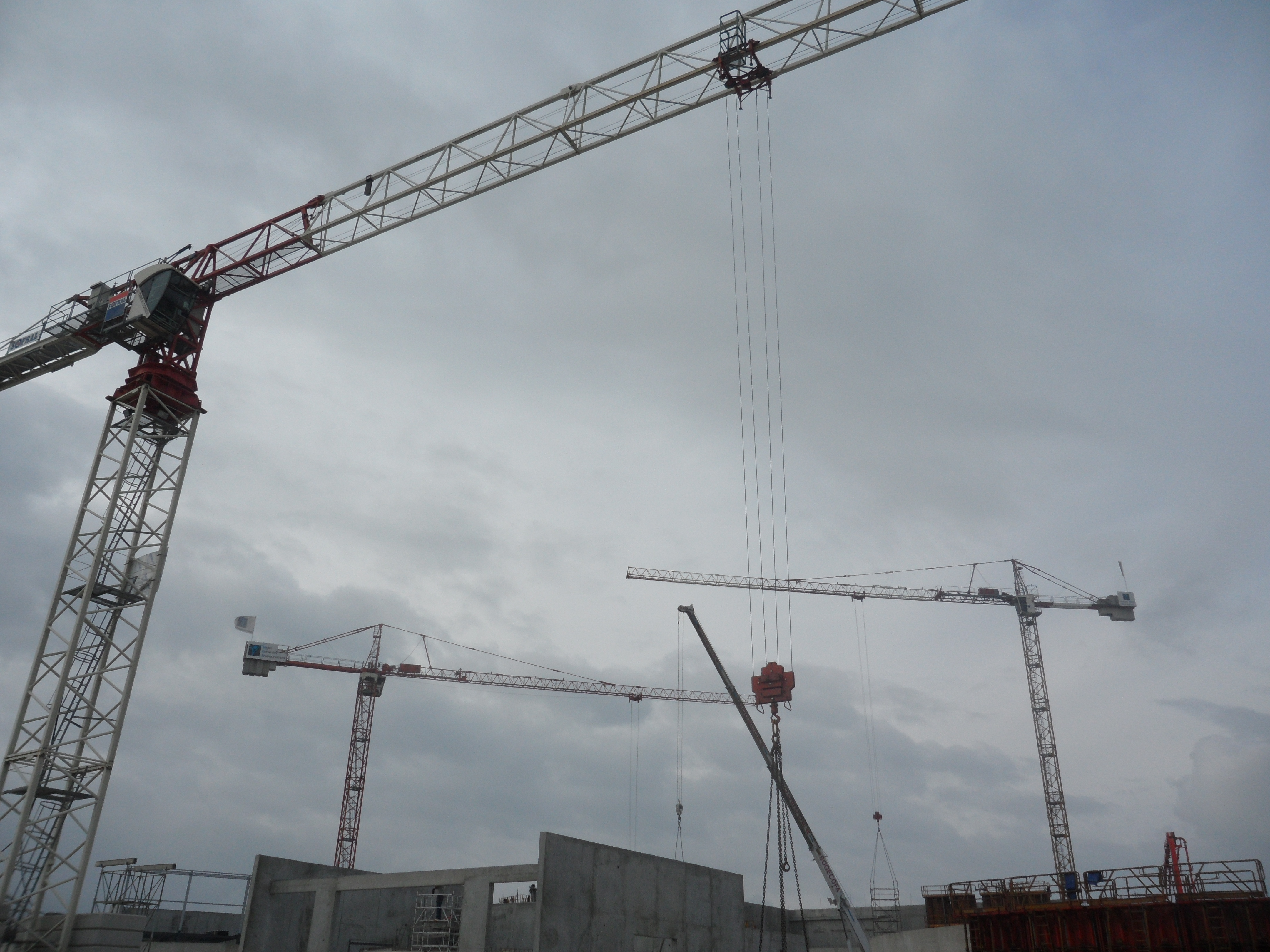 grue à Châtelaillon-Plage